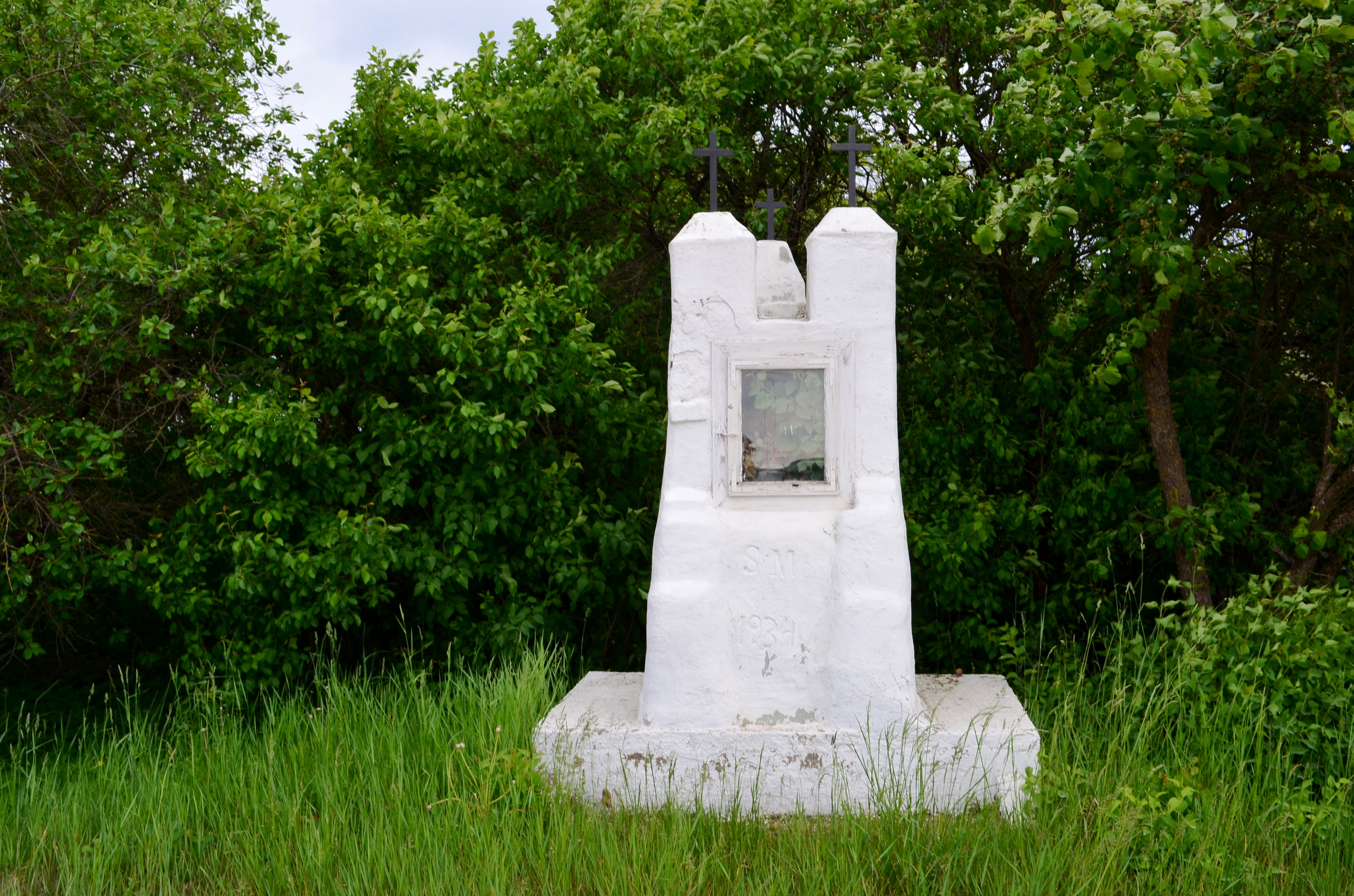 Pakėlės koplytėlė, Daužnagiai, Radviliškio r.